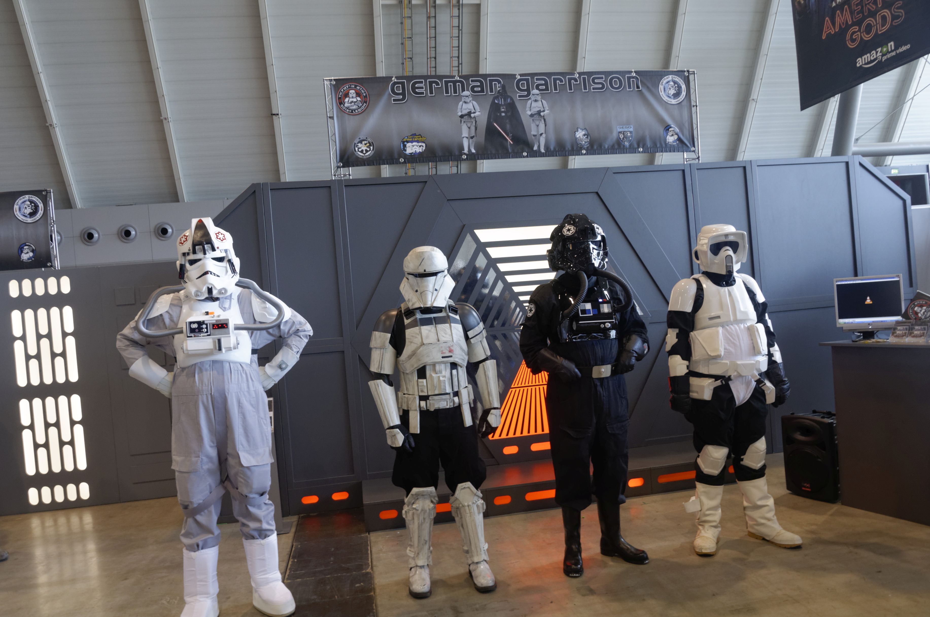 Bilder von der Comic Con Germany in Stuttgart 2017